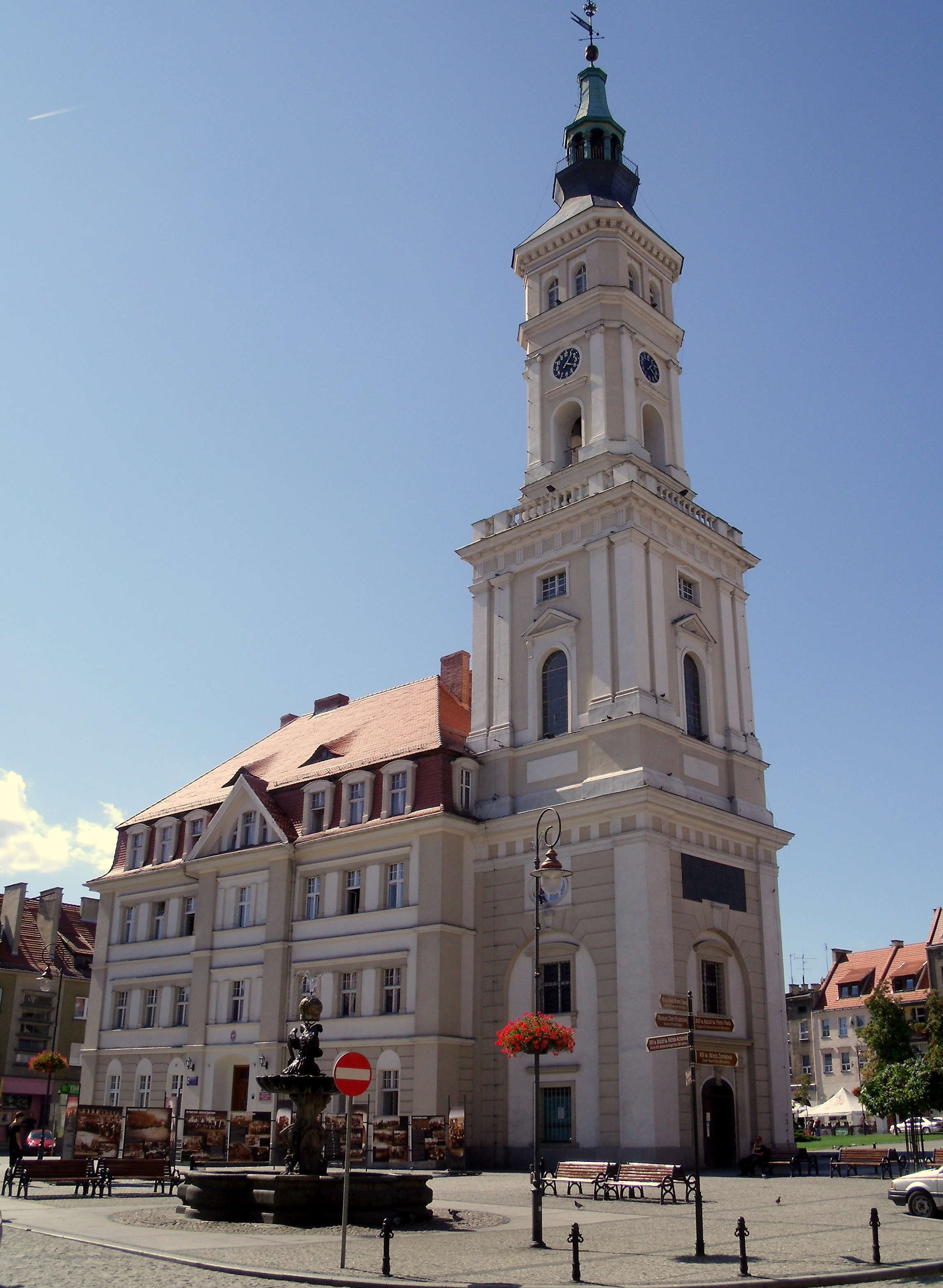 Prudnik, ratusz (XVIII w., 1840) 10.1958.